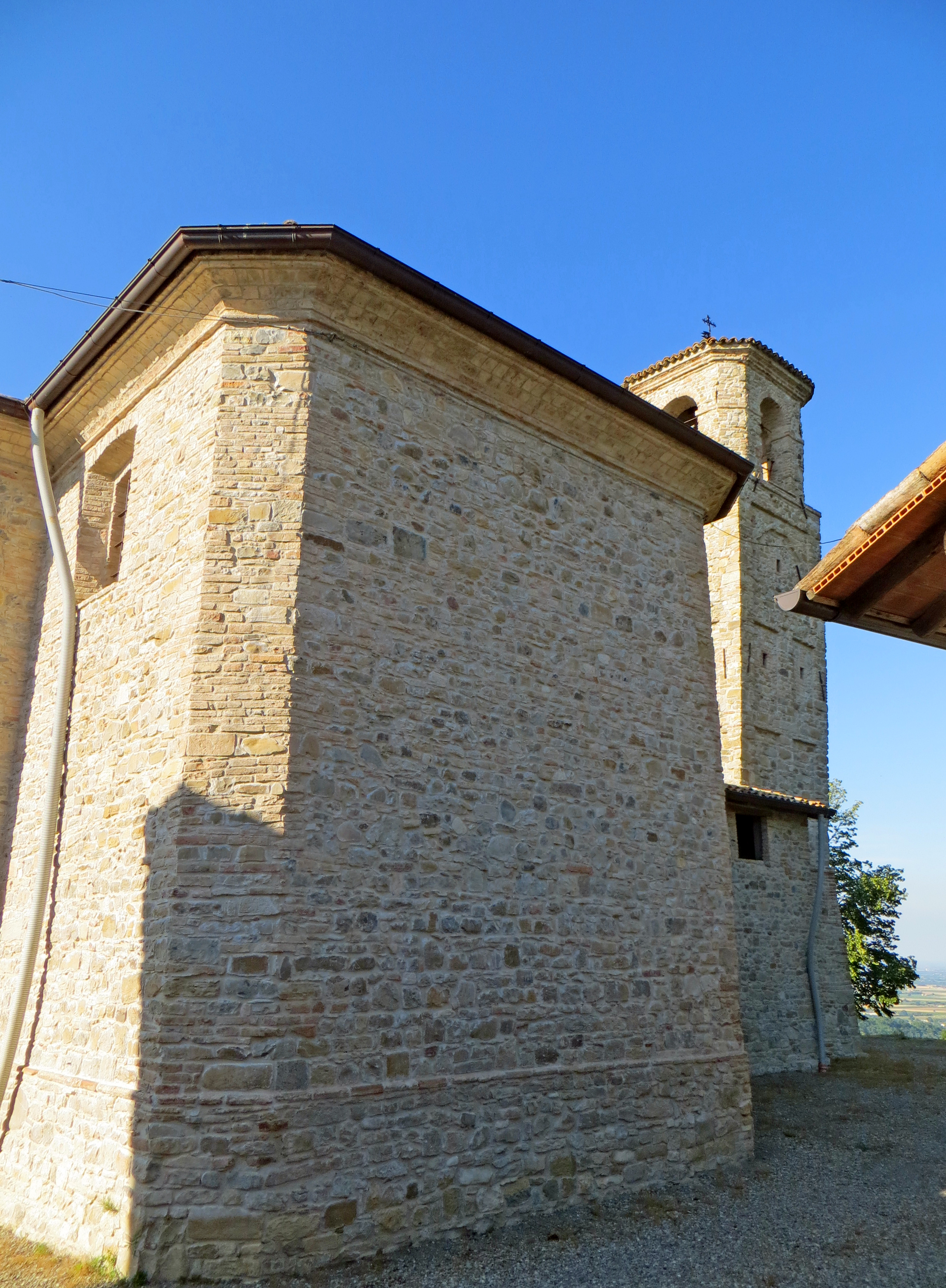 Pieve di Sant'Antonino Martire (Barbiano, Felino) - abside